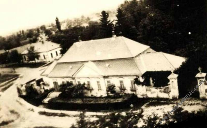 Српски (ћирилица): Дворац Зако, приказ здања